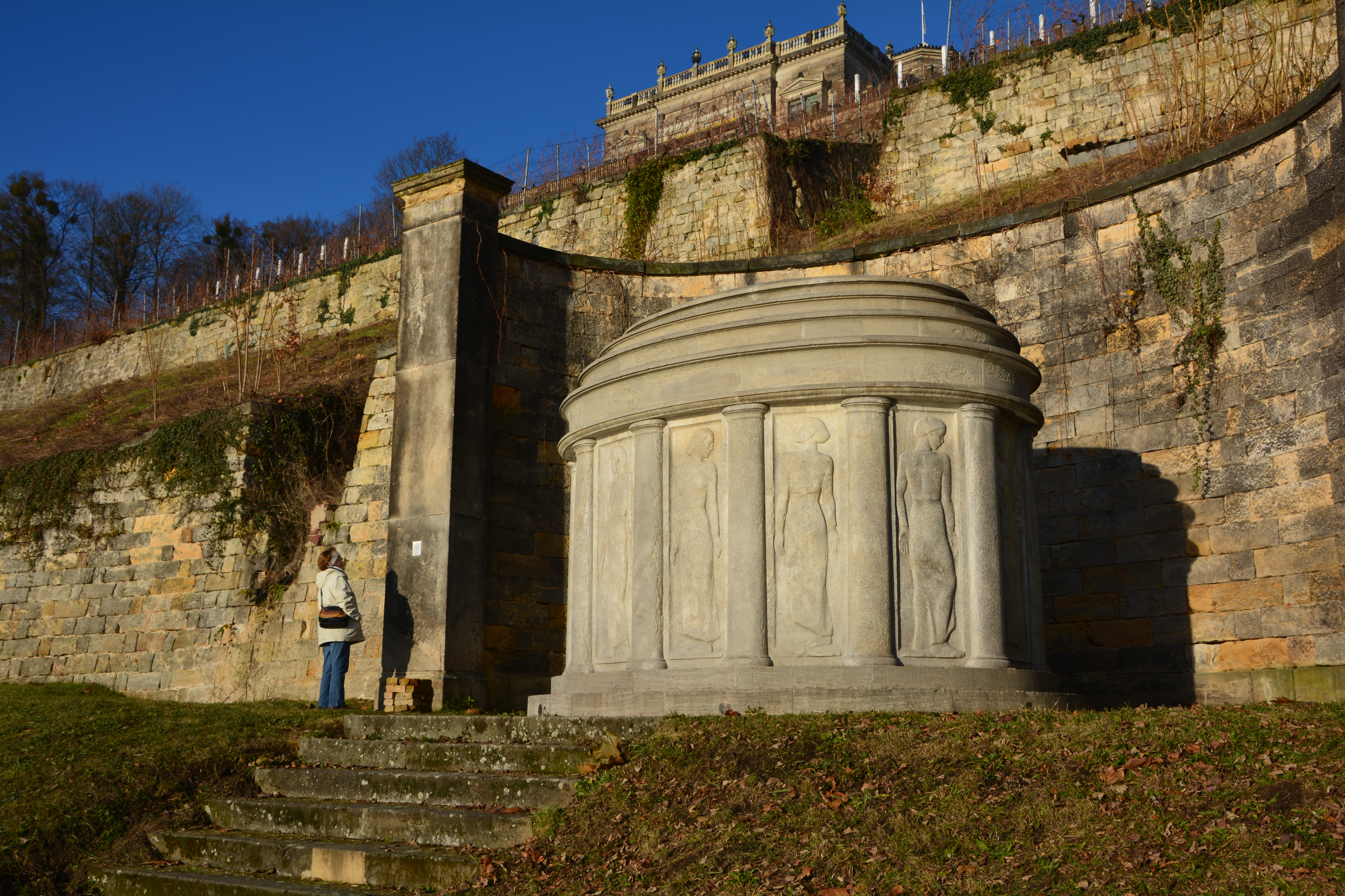 Dresden Lingnerschloss im Herbst, Lingnermausoleum (1920/21), von Hans Poelzig (Architekt) und Georg Kolbe (Bildhauer)